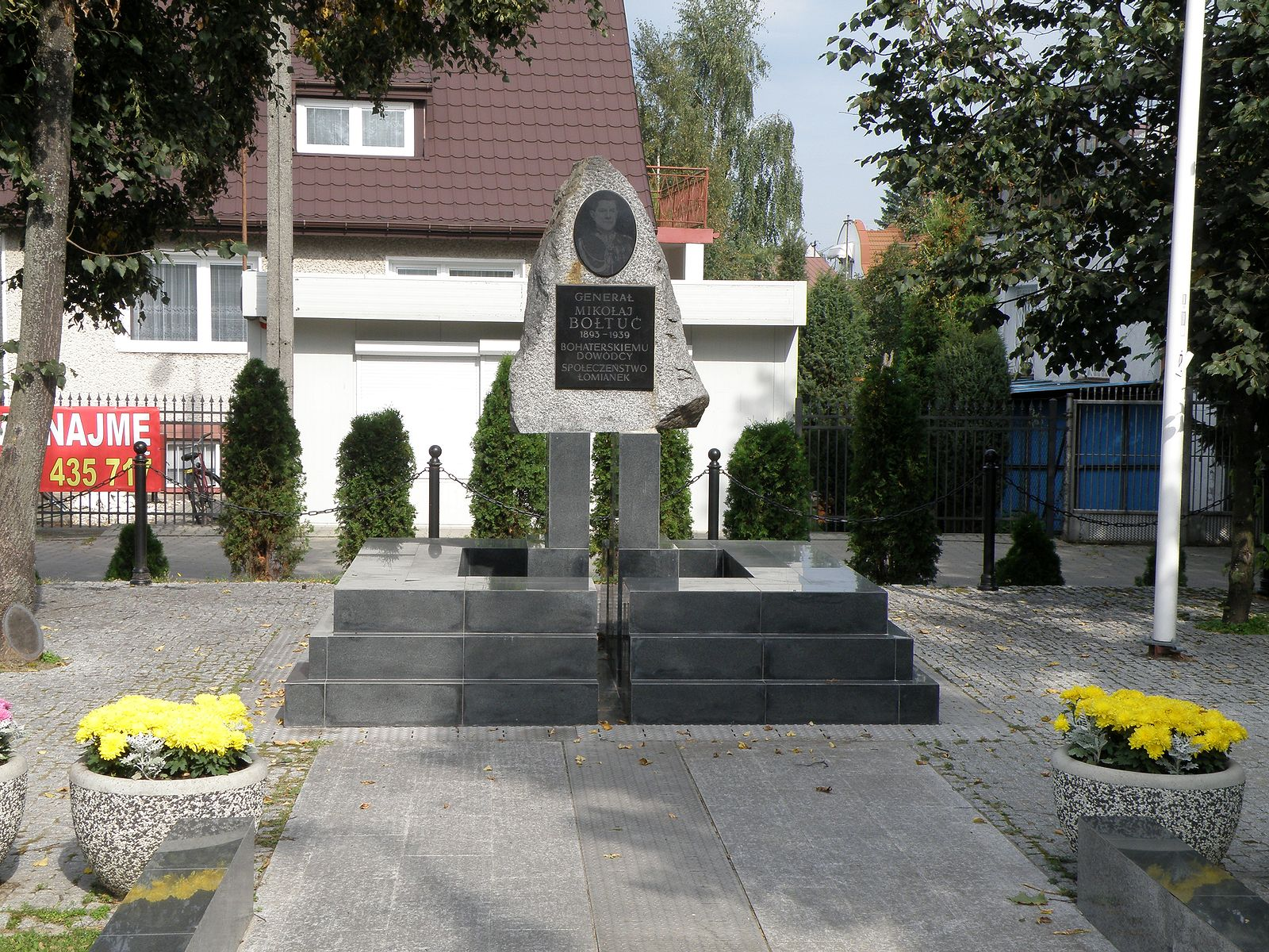 Pomnik gen. Bołtucia w Łomiankach, stan w roku 2011 po remoncie w 2009